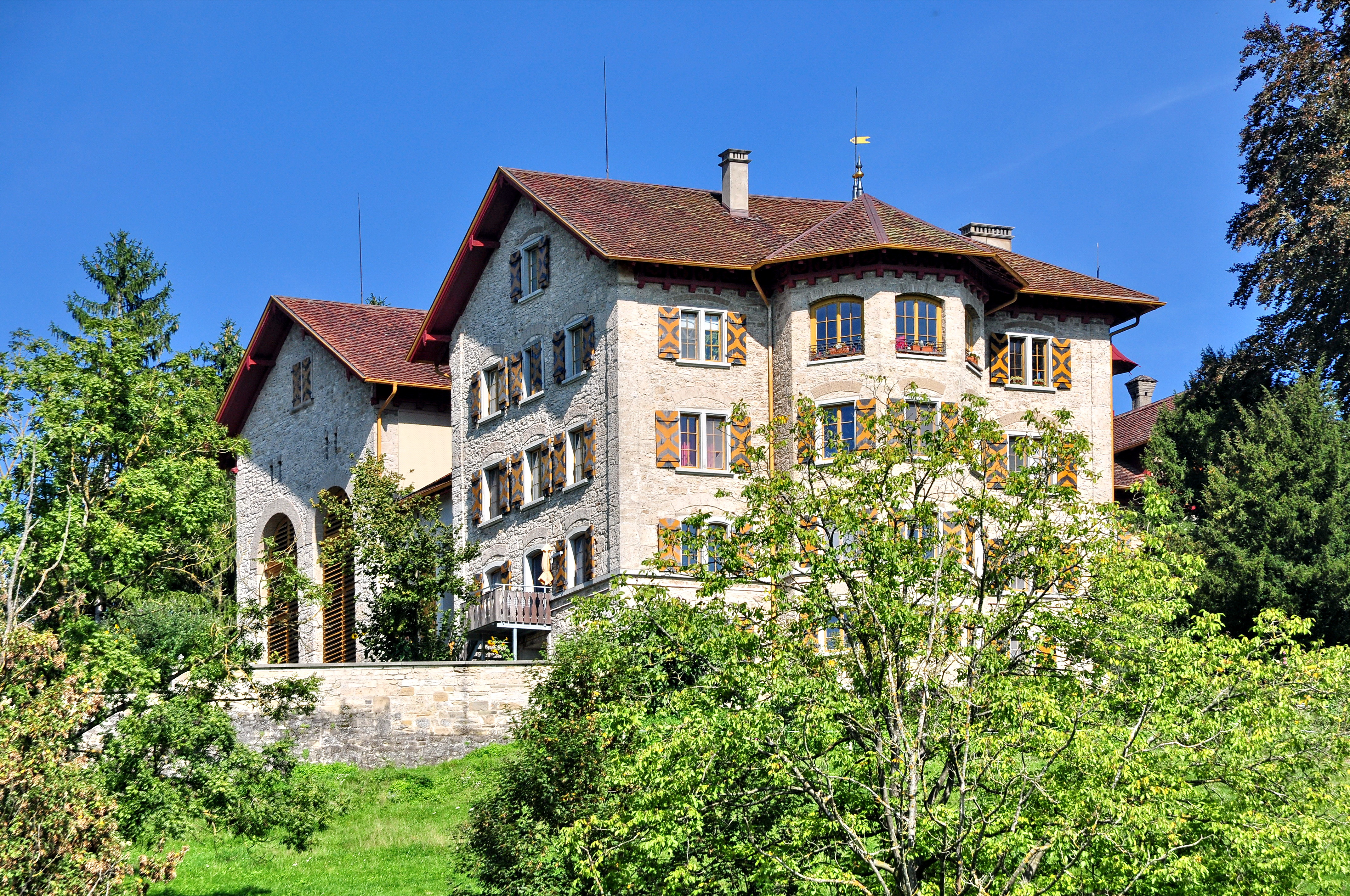 Schloss Tüfenbach in Freienstein-Teufen (Switzerland)